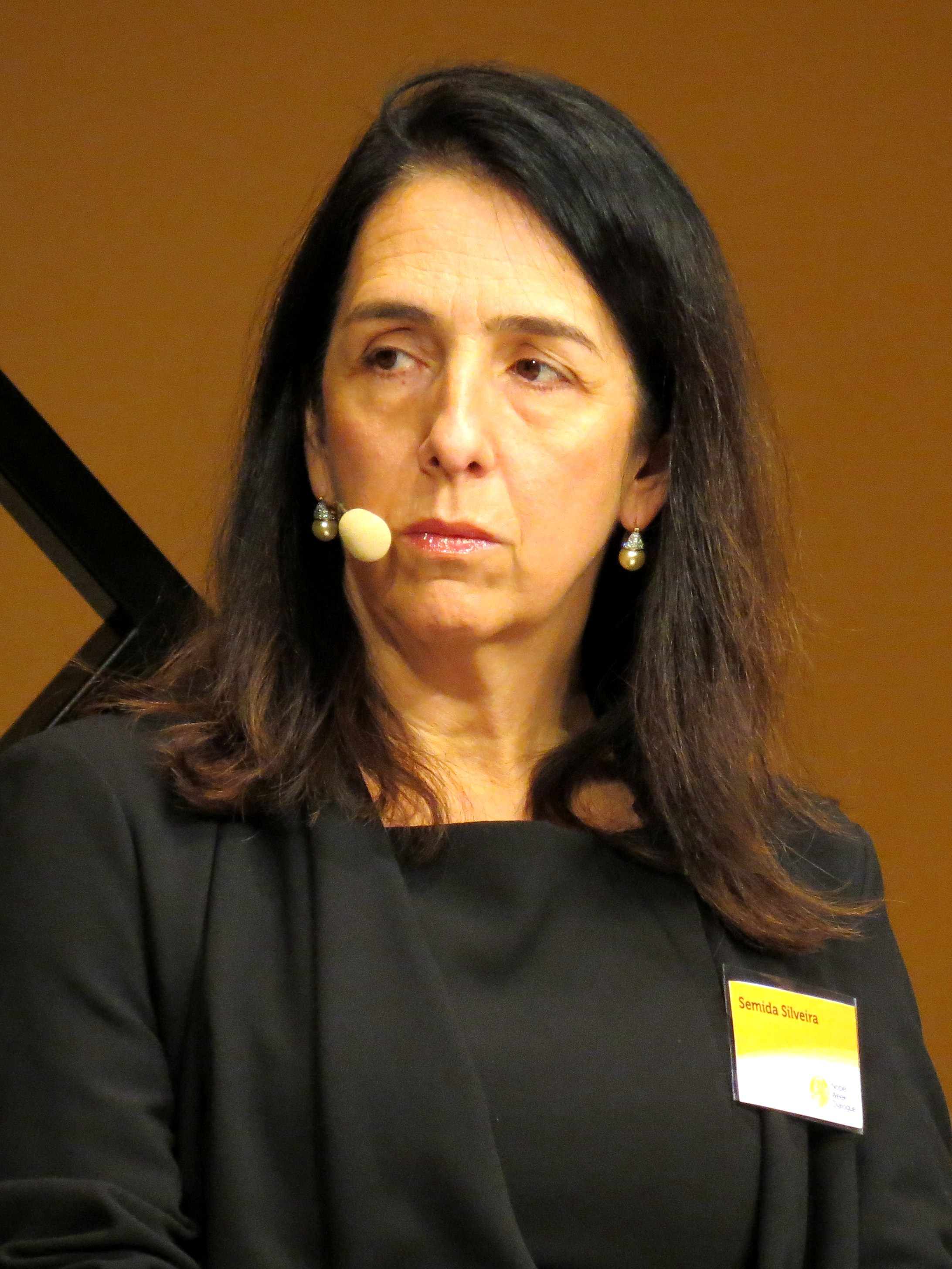 Semida Silveira under en paneldiskussion på Svenska Mässan i Göteborg där Nobel Week Dialogue 2013 arrangerades.